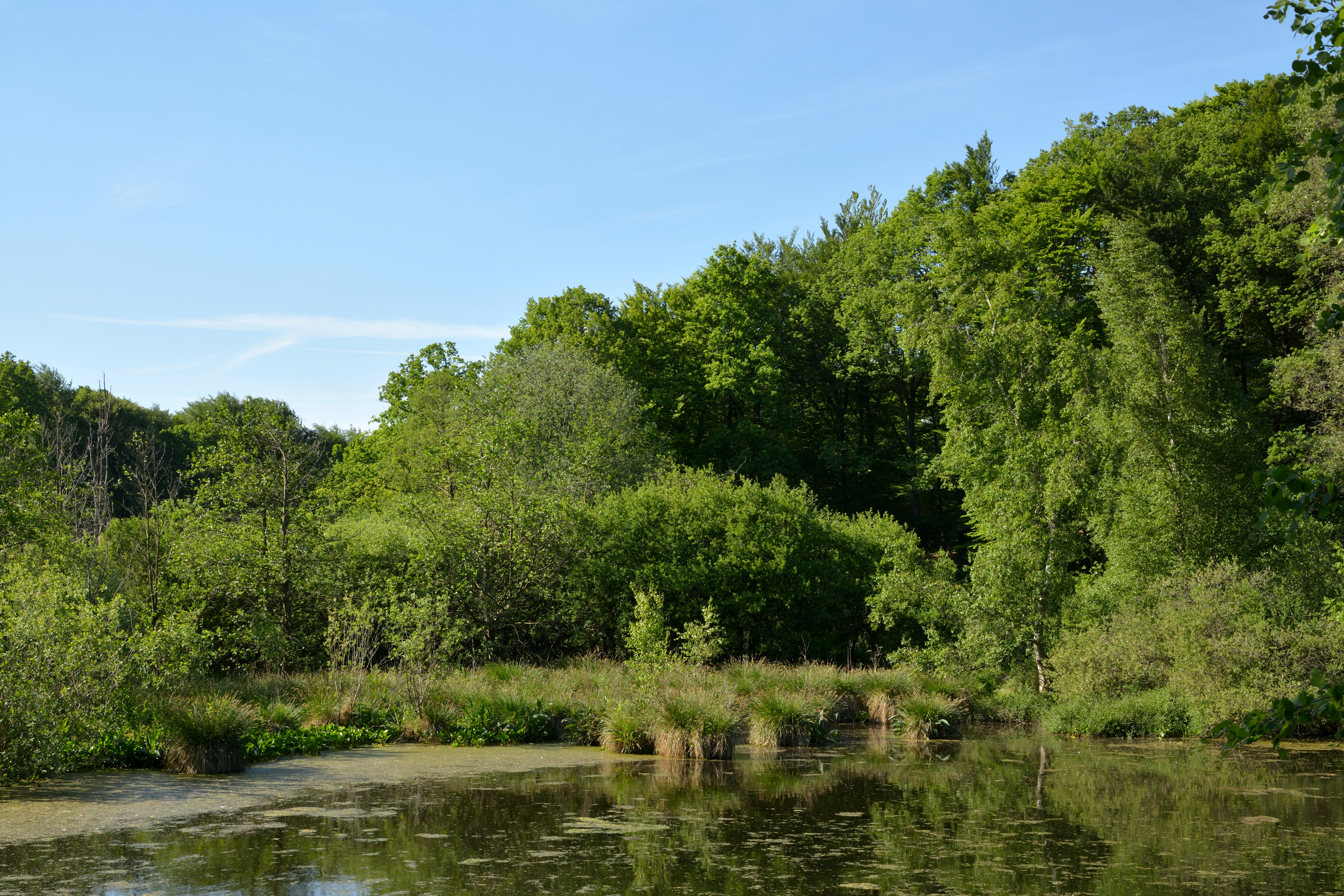 Impressionen aus dem Landschaftsschutzgebiet "Gieselautal" in den Gemeinden Albersdorf und Wennbüttel, Schleswig-Holstein.